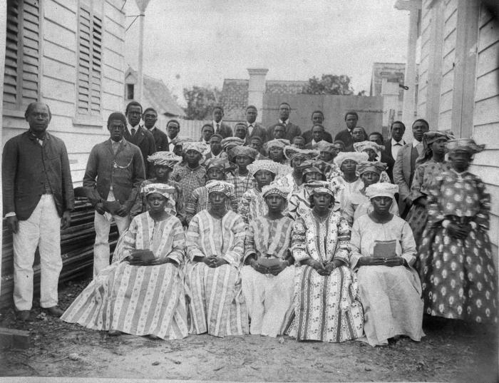 Foto. Een zangkoor van Marrons afkomstig uit Gansé met meester IJveraar, Suriname.